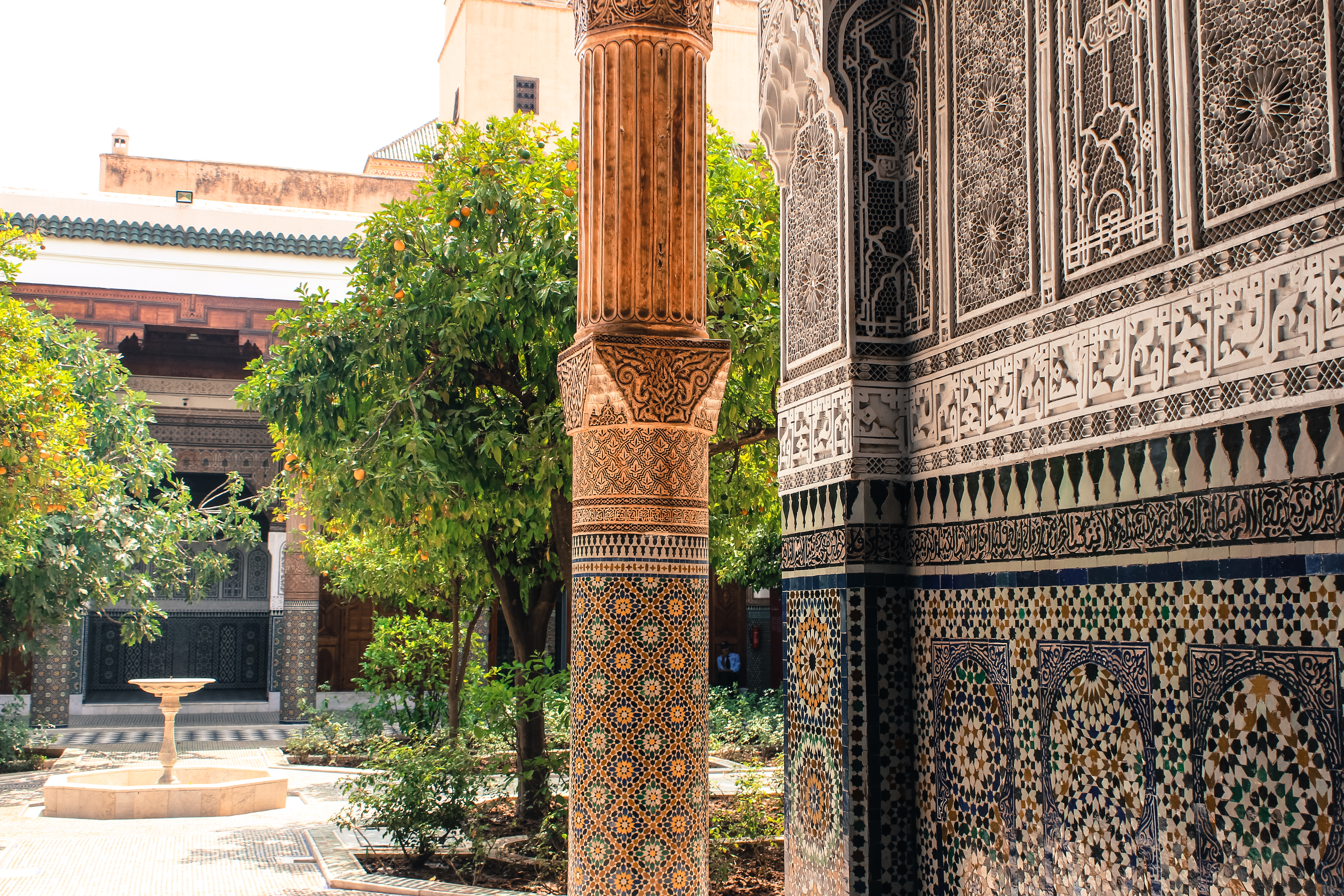 دار الباشا بمراكش، قصر باشا مراكش و قايد الأطلس الكبير التهامي الكلاوي زمن الحماية الفرنسية